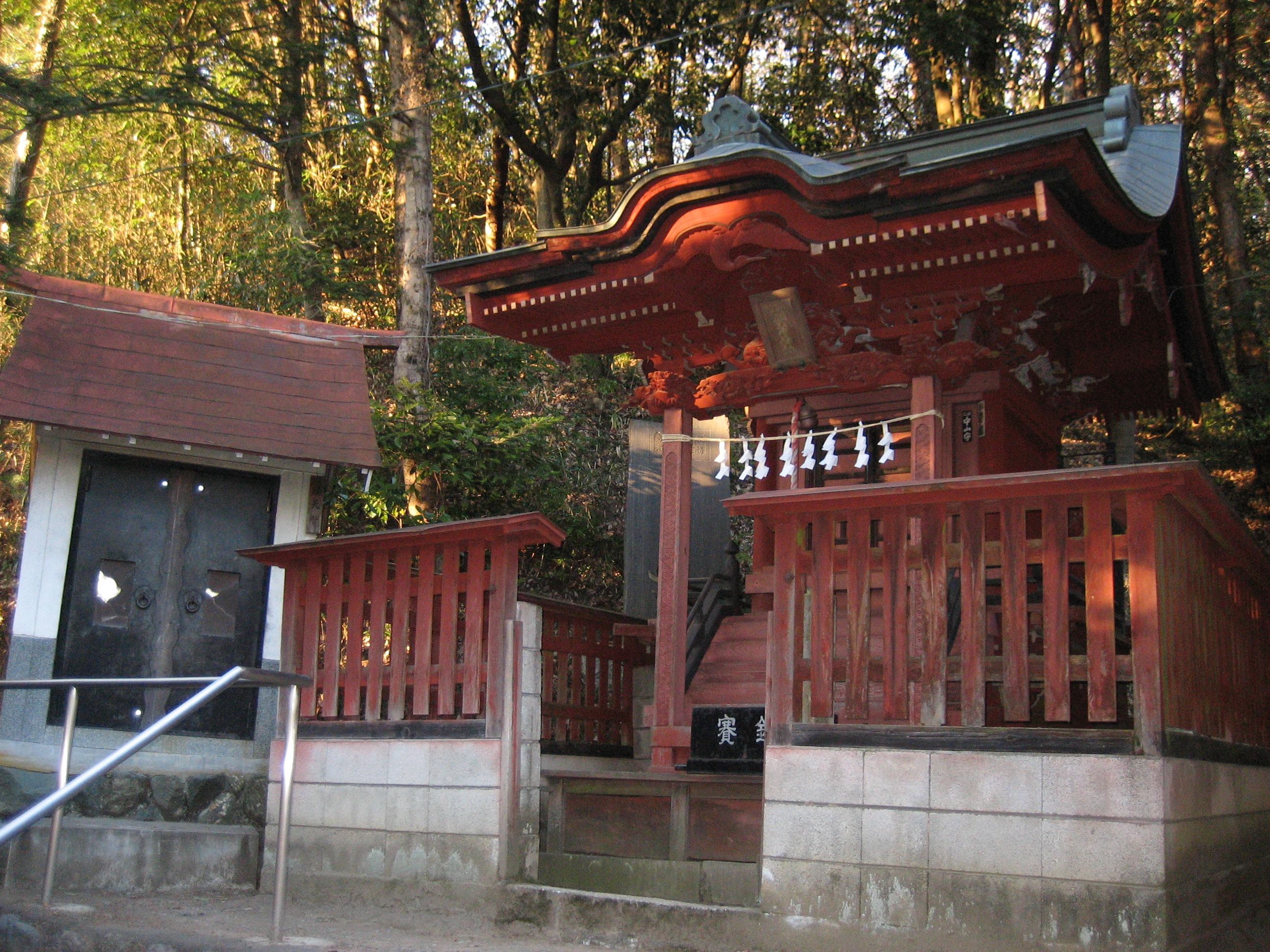 秩父市黒谷に鎮座する和銅出雲神社